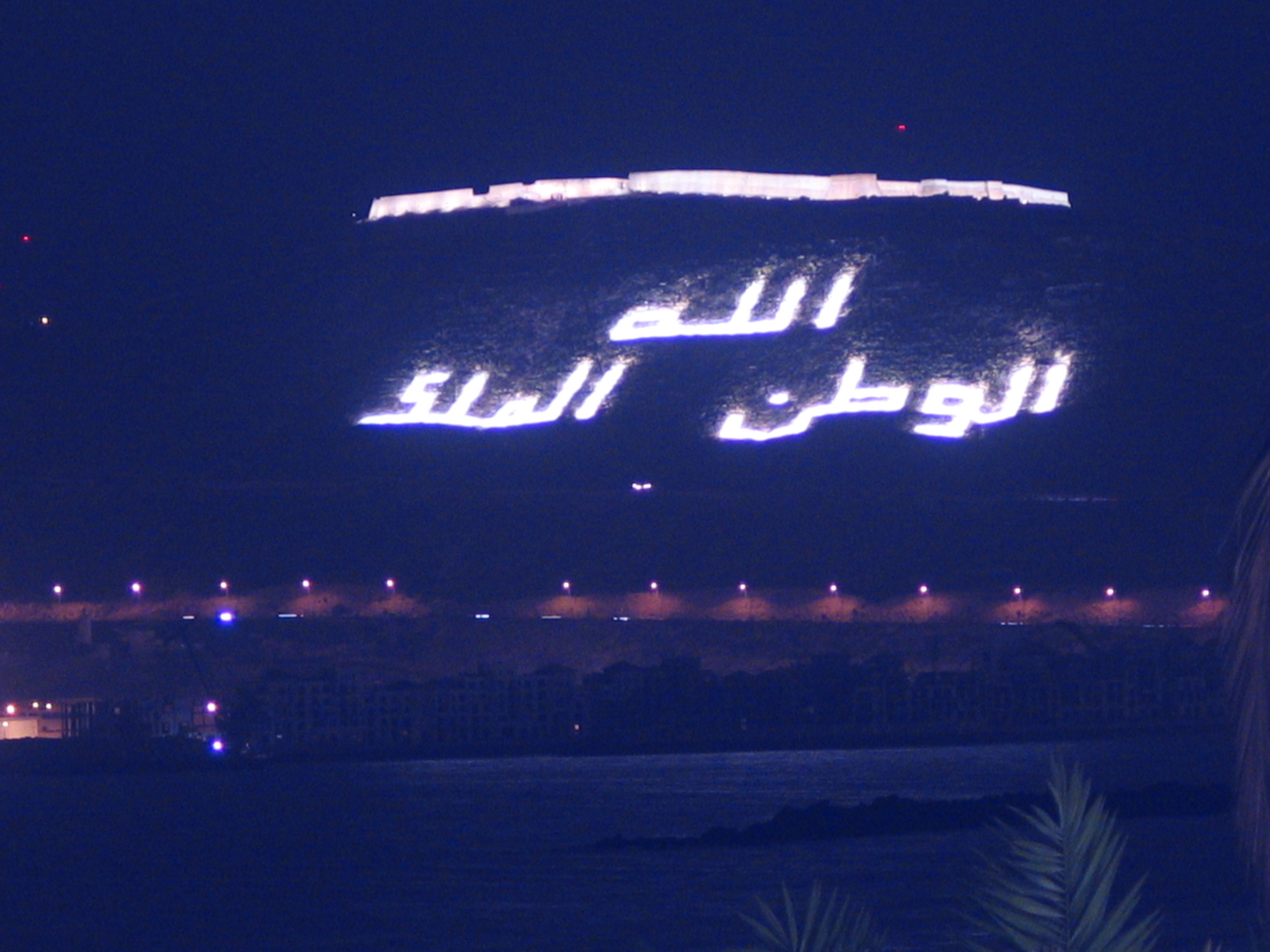 Agadir (Maroc), la Kasbah Oufella la nuit, inscription : « Dieu, La Patrie, le Roi »